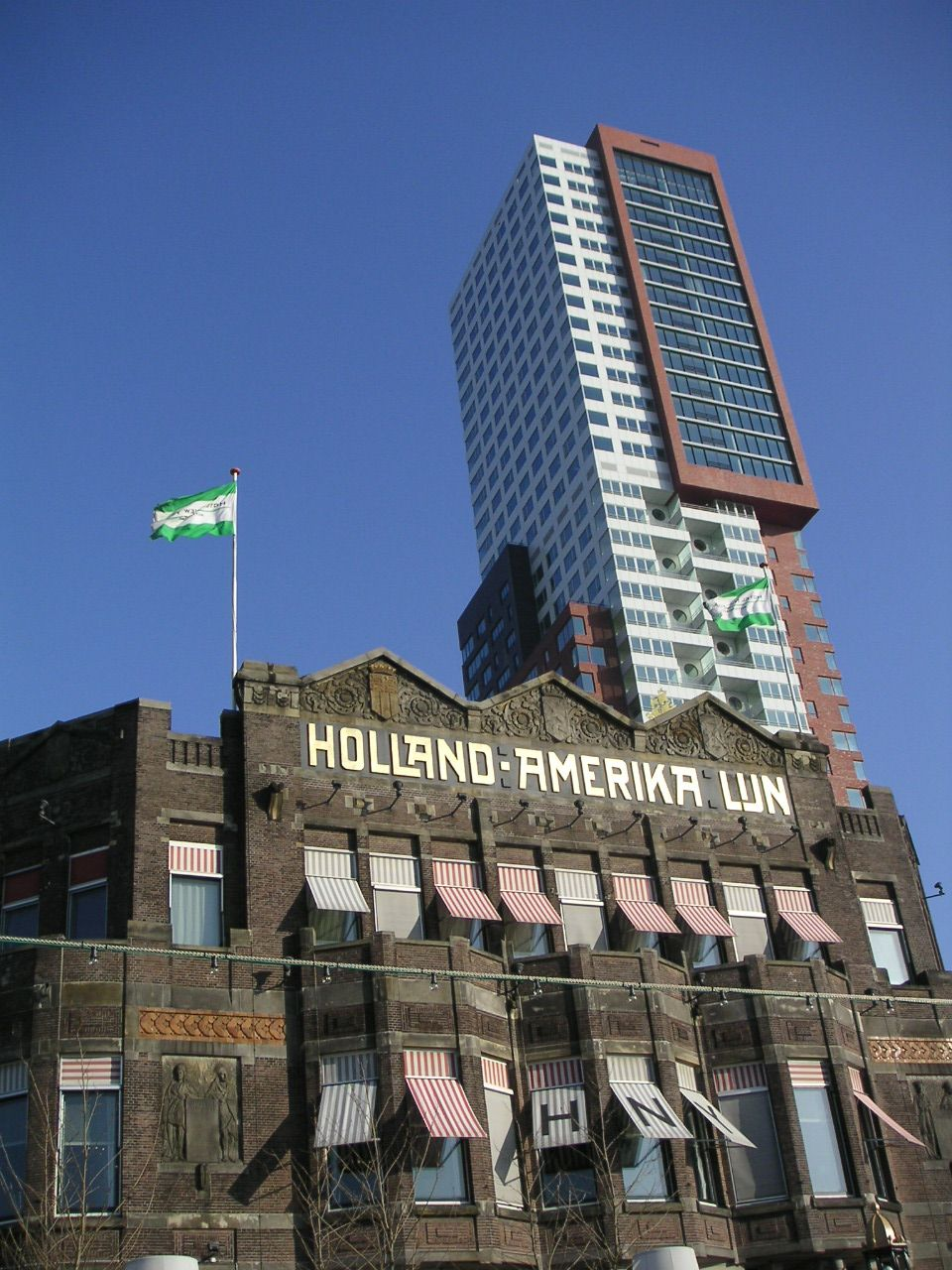 Rotterdam [?]